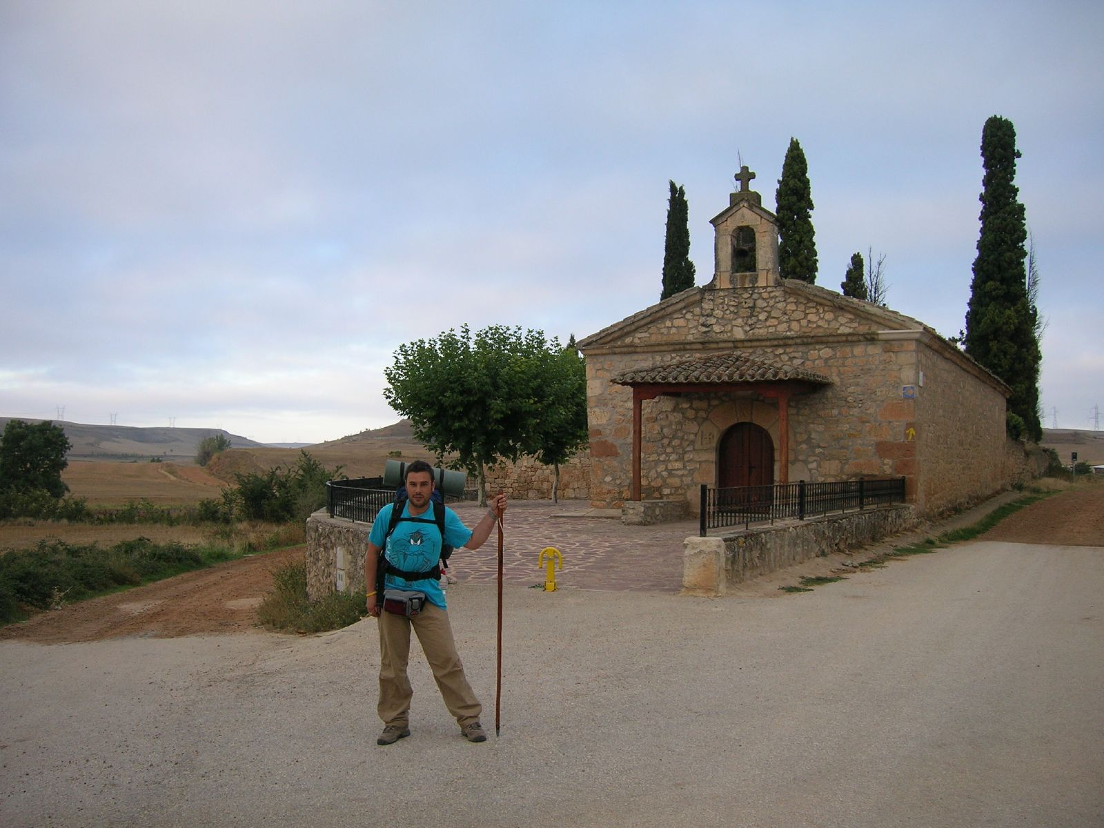 Ermita de Nuestra Señora del Monasterio. Esta foto participó en el juego En un lugar de Flickr. Se trata de adivinar el lugar de la fotografía. No contestes si no estás registrado en el juego!!!!. Si deseas contestar, únete primero! muchas gracias.